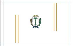 Bandeira Oficial do Município de Irati, Estado do Paraná, retirado do site da Prefeitura Municipal de Irati (